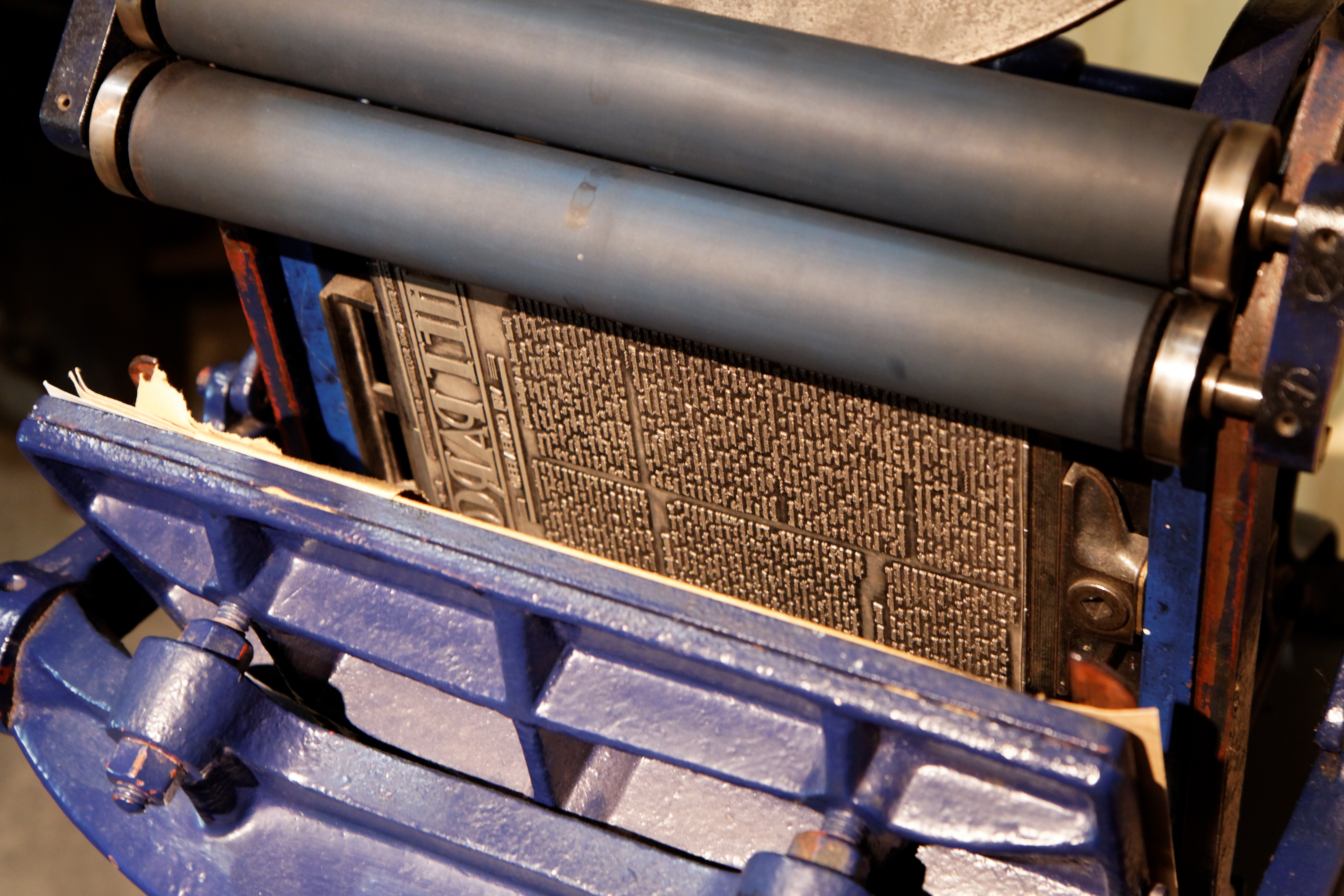 090626-121508_ 1754_50D_raw